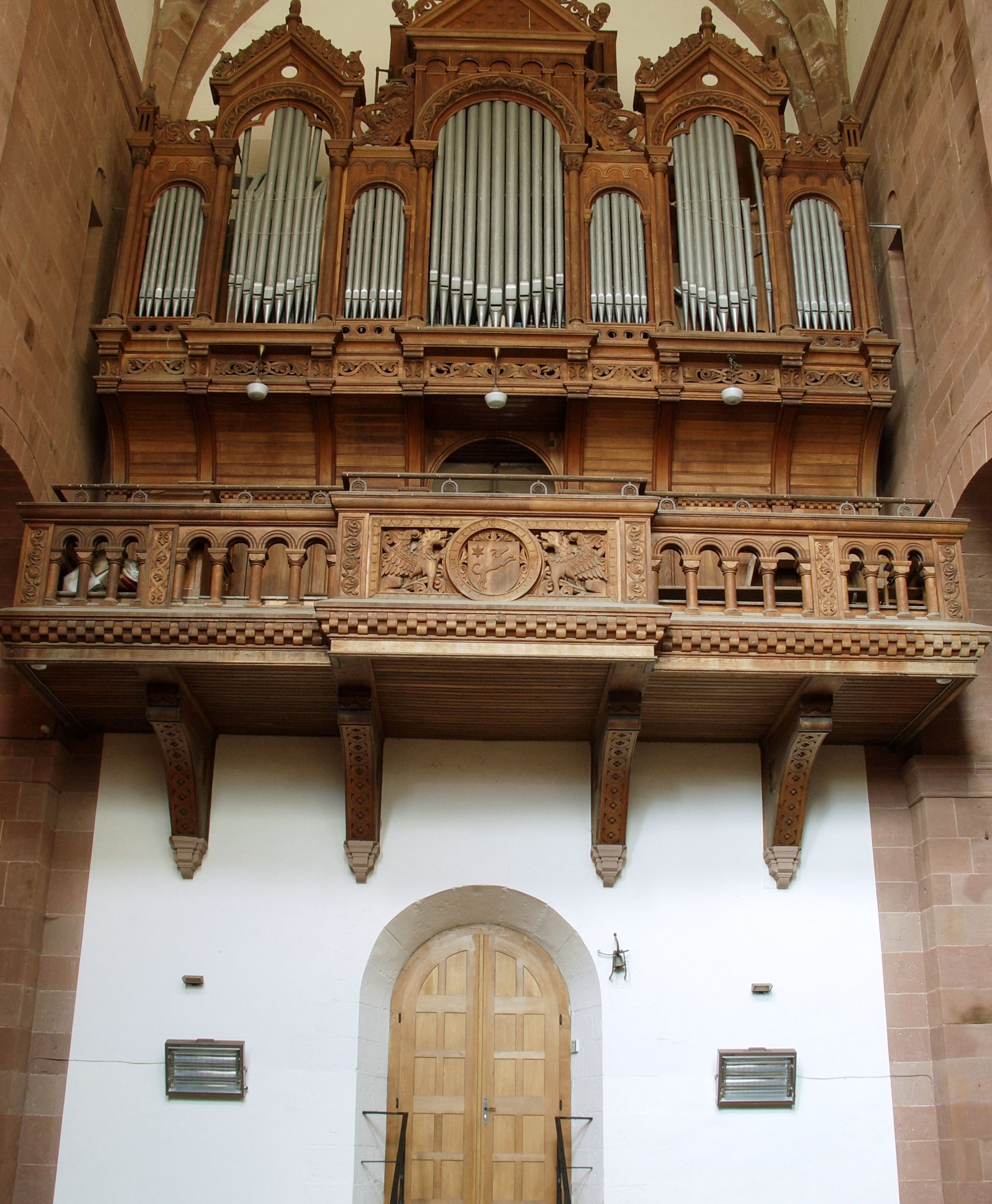 Abadia de Murbach - Orgue